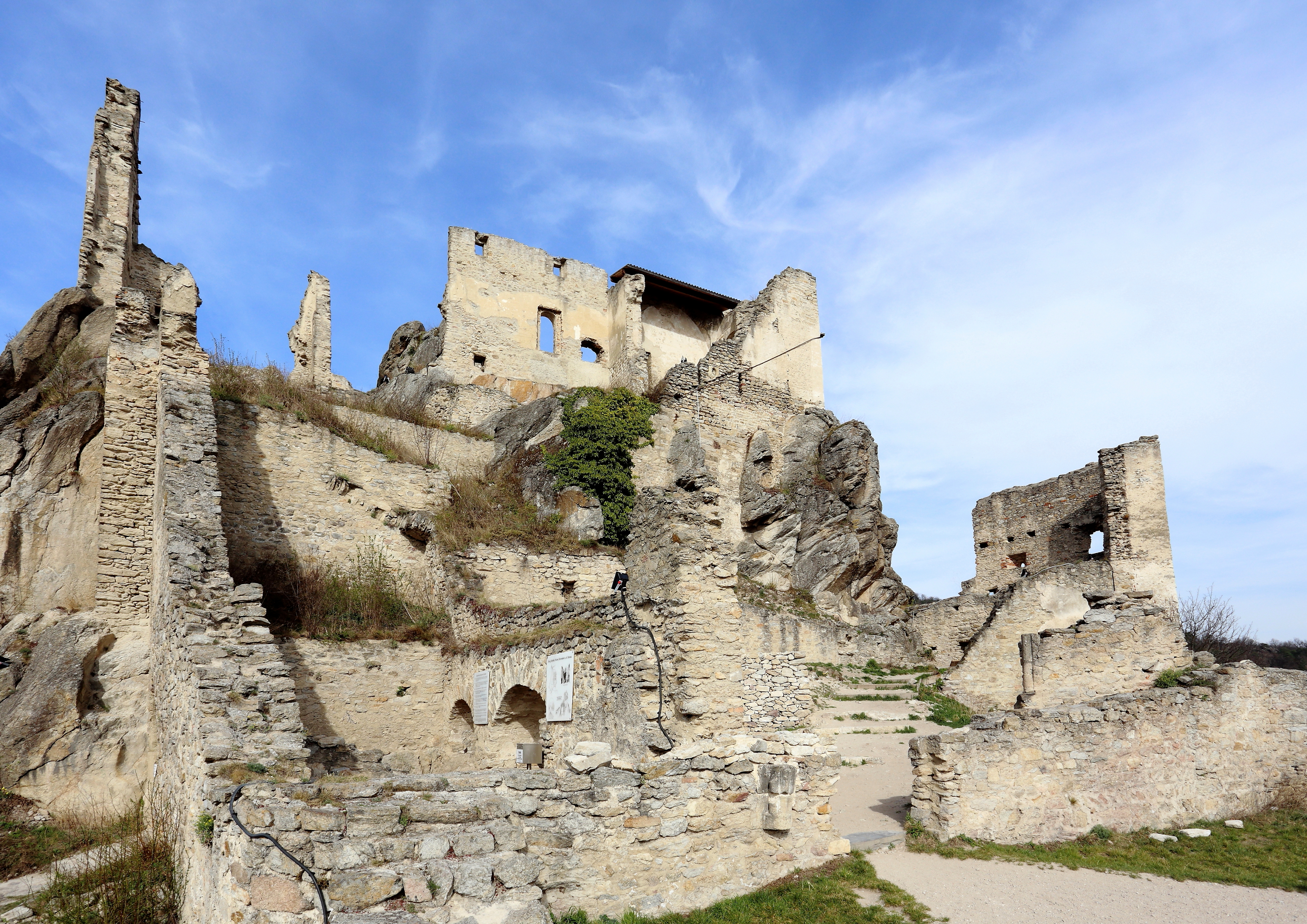 Burgruine in Dürnstein.